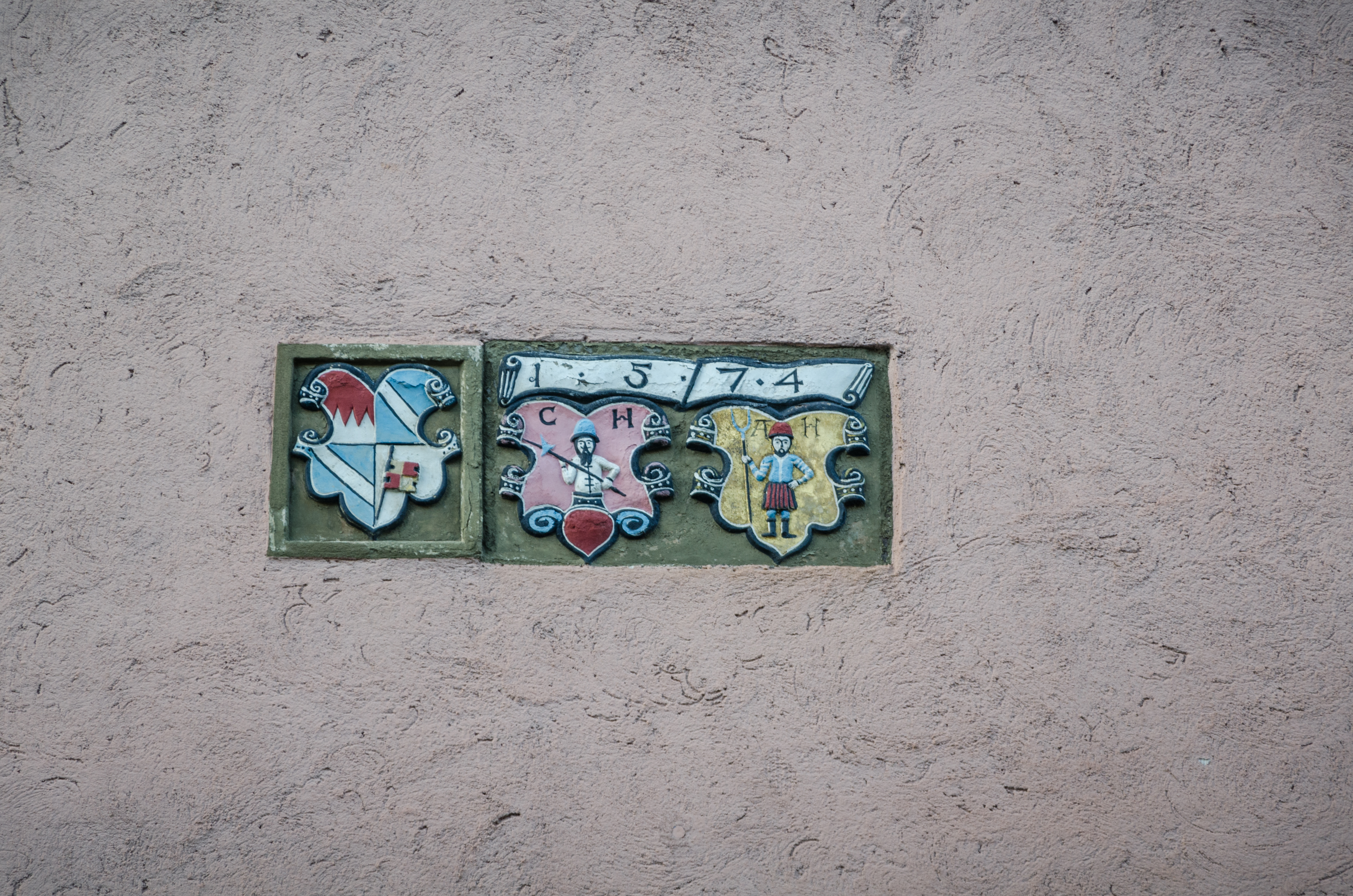 Volkach, Hauptstraße 22